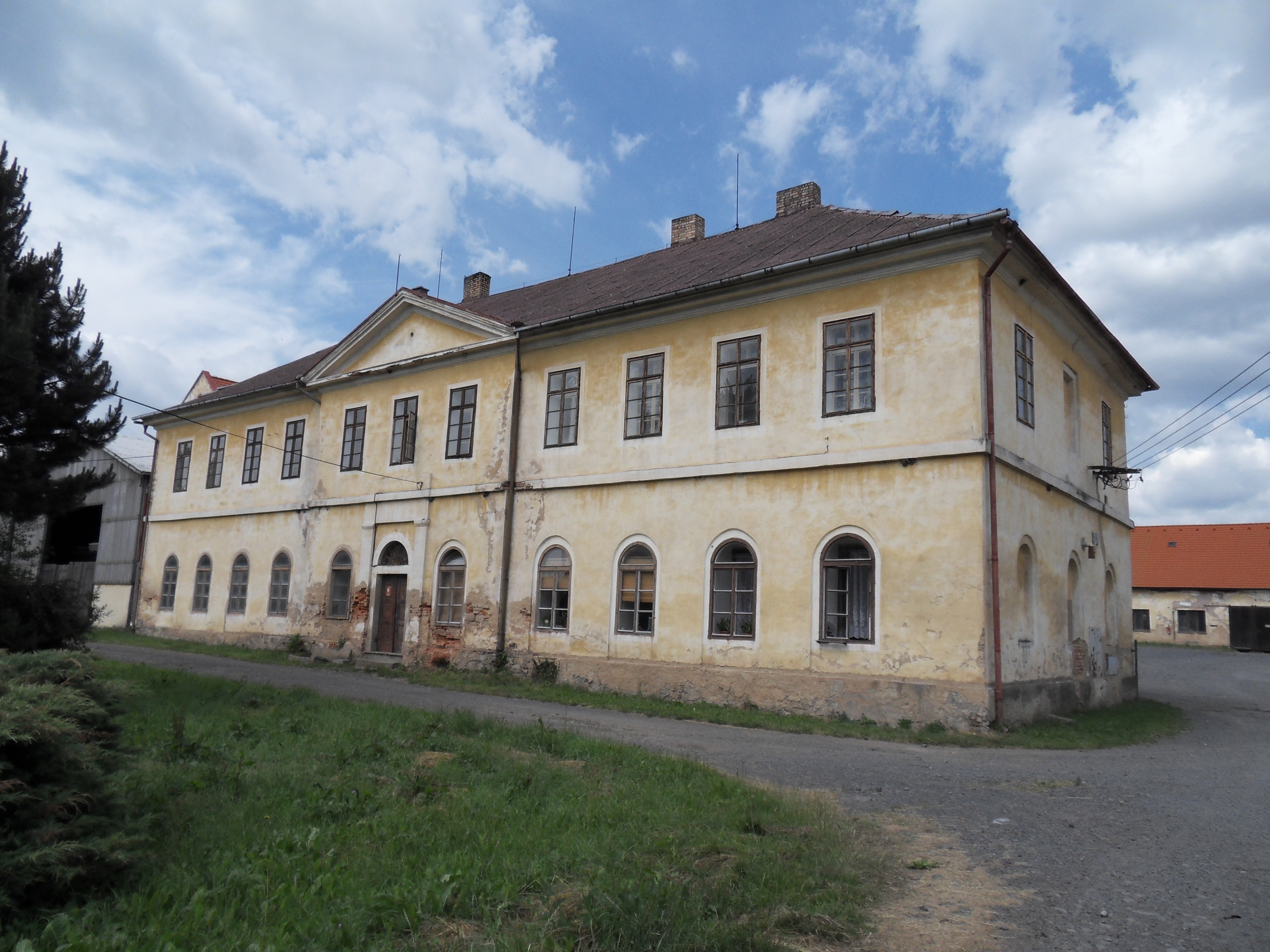 Obytná budova zemědělského dvora čp. 21, Hrad Nečtiny 21, Hrad Nečtiny.